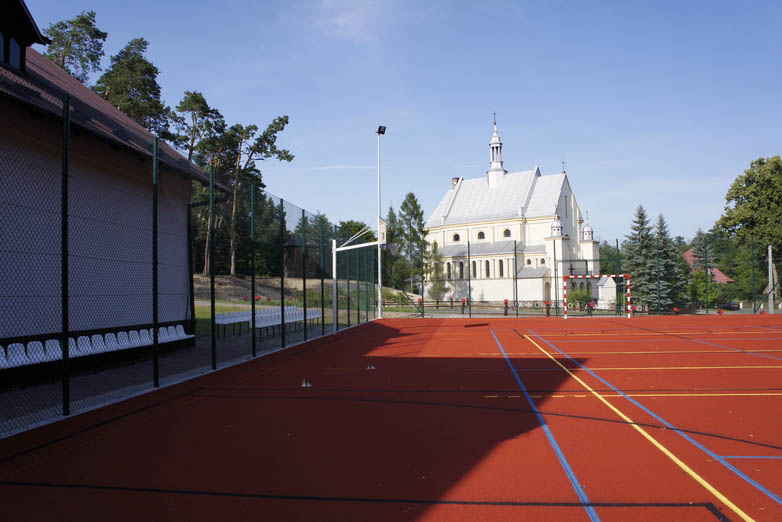 Boisko wielofunkcyjne w Majdanie Sieniawskim